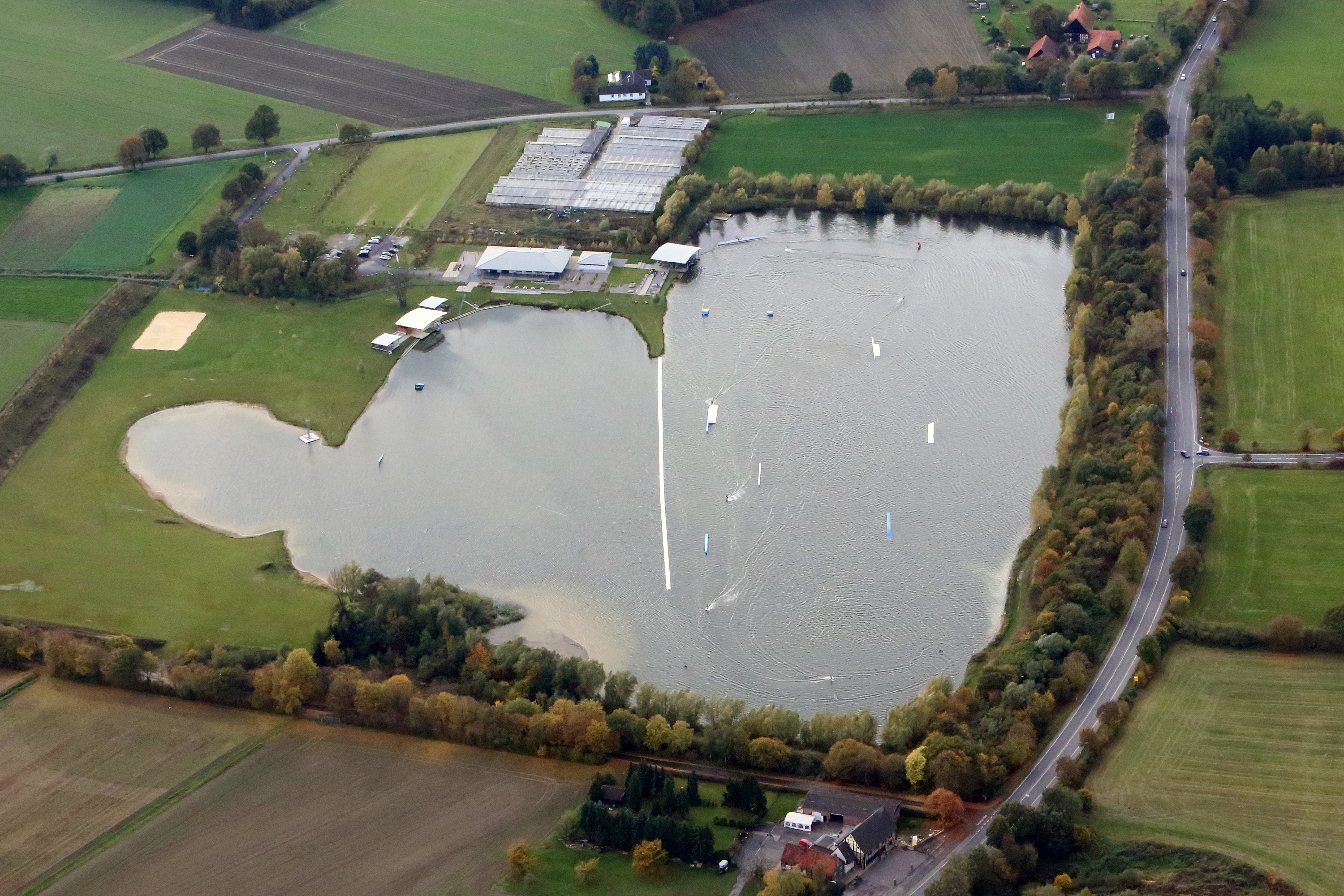 Luftbild Wasserski Anlage Hamm Uentrop 2013